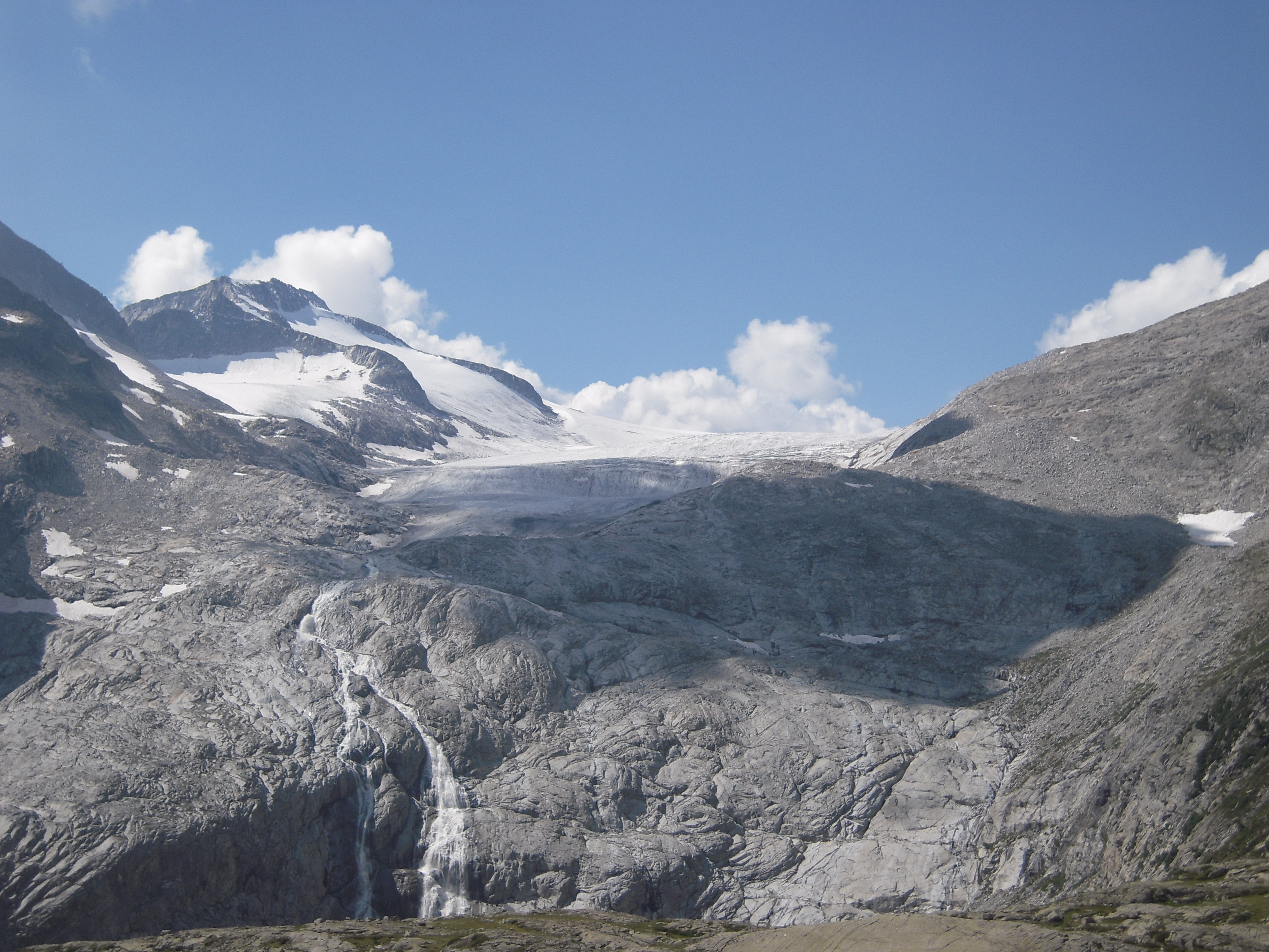 La vedretta del Mandrone punto più basso del ghiacciaio dell'adamello, si possono notare le rocce granitiche plasmate dal ghiacciaio ove si è ritirato.Nelle foto presentate dal Al Gore in "Una scomoda verità" il ghiacciaio arrivava al punto dove è stata scattata la foto.